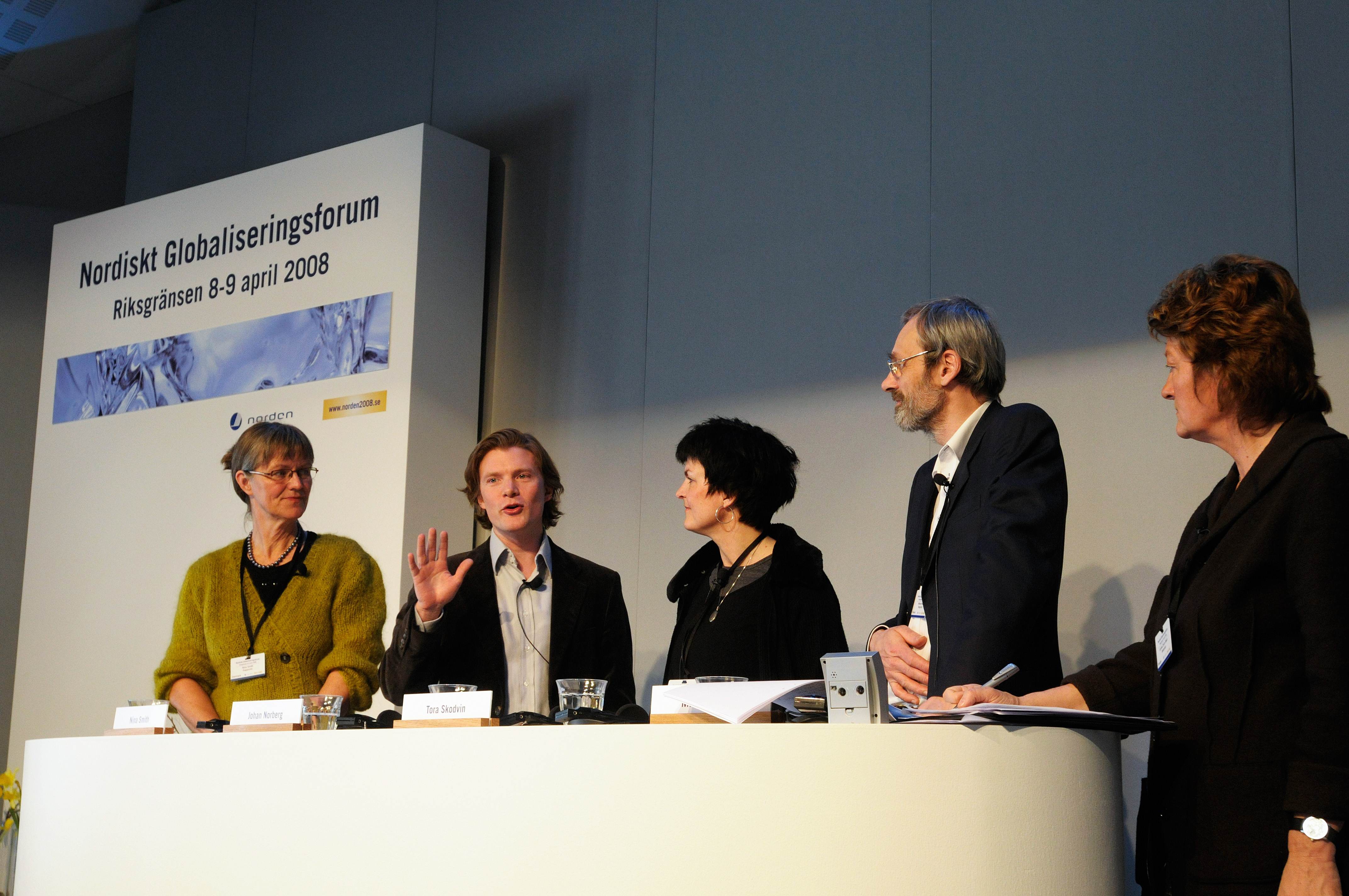 Rapportörenrna i diskussion med moderatorn vid det nordiska globaliseringsforumet i Riksgränsen 2008-04-09